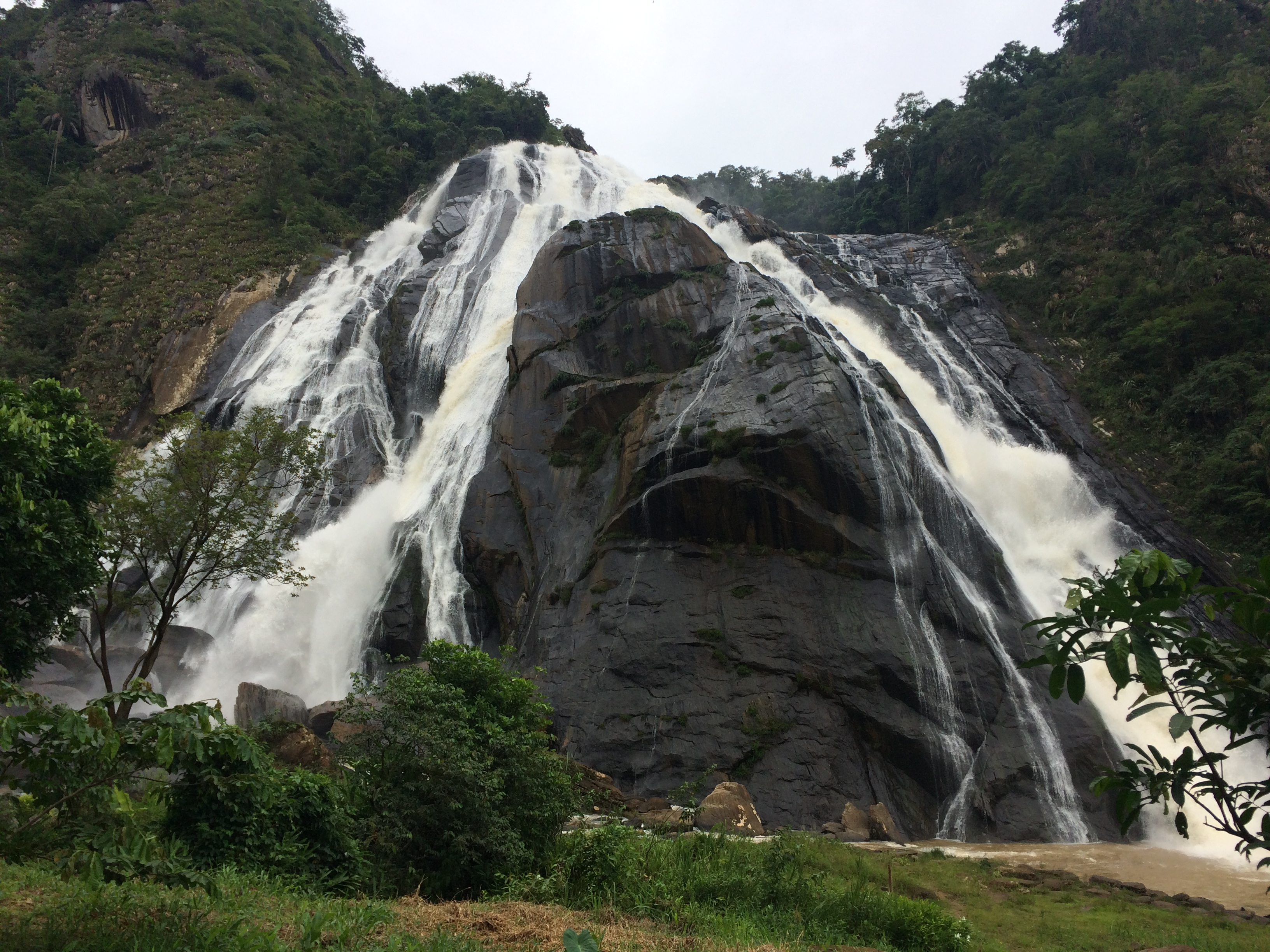 Cachoeira da Fumaça - Alegre